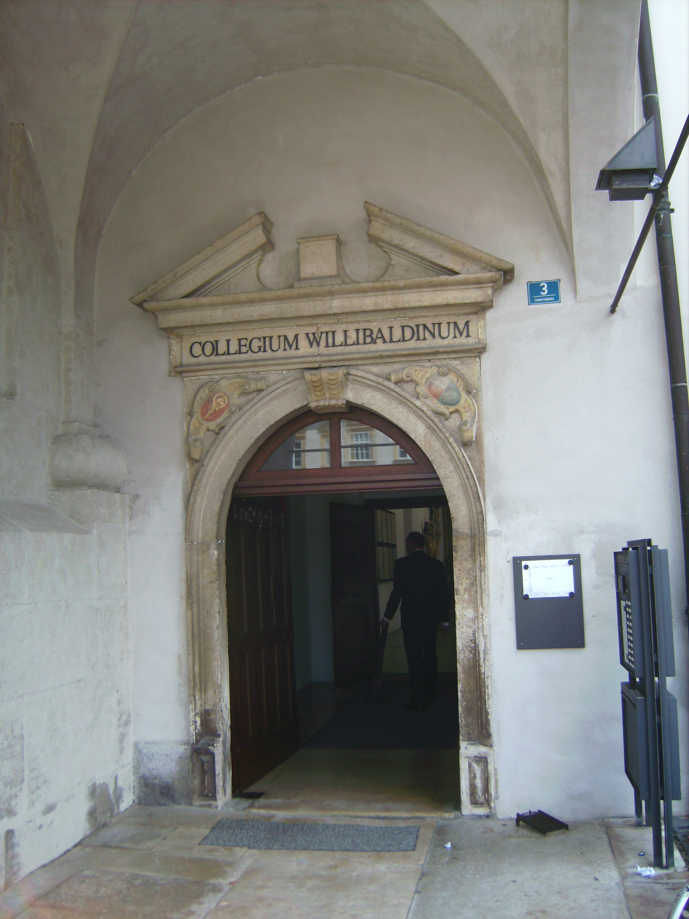 Priesterseminar